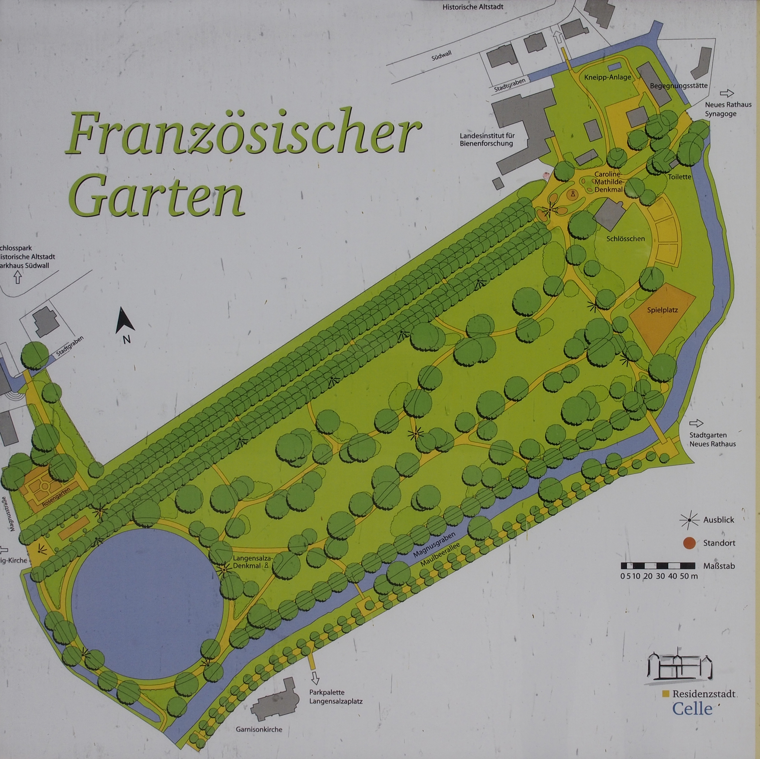 Übersichts-Plan des Französischen Gartens in Celle